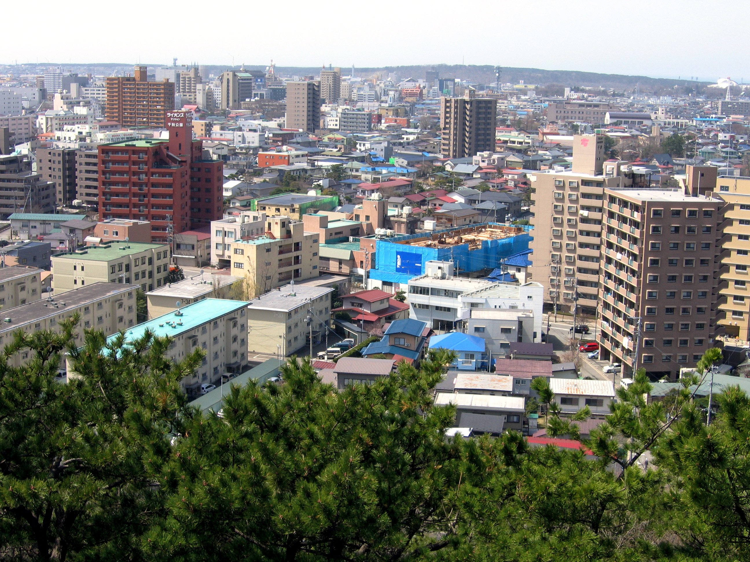 Skyline of Akita City, Akita.